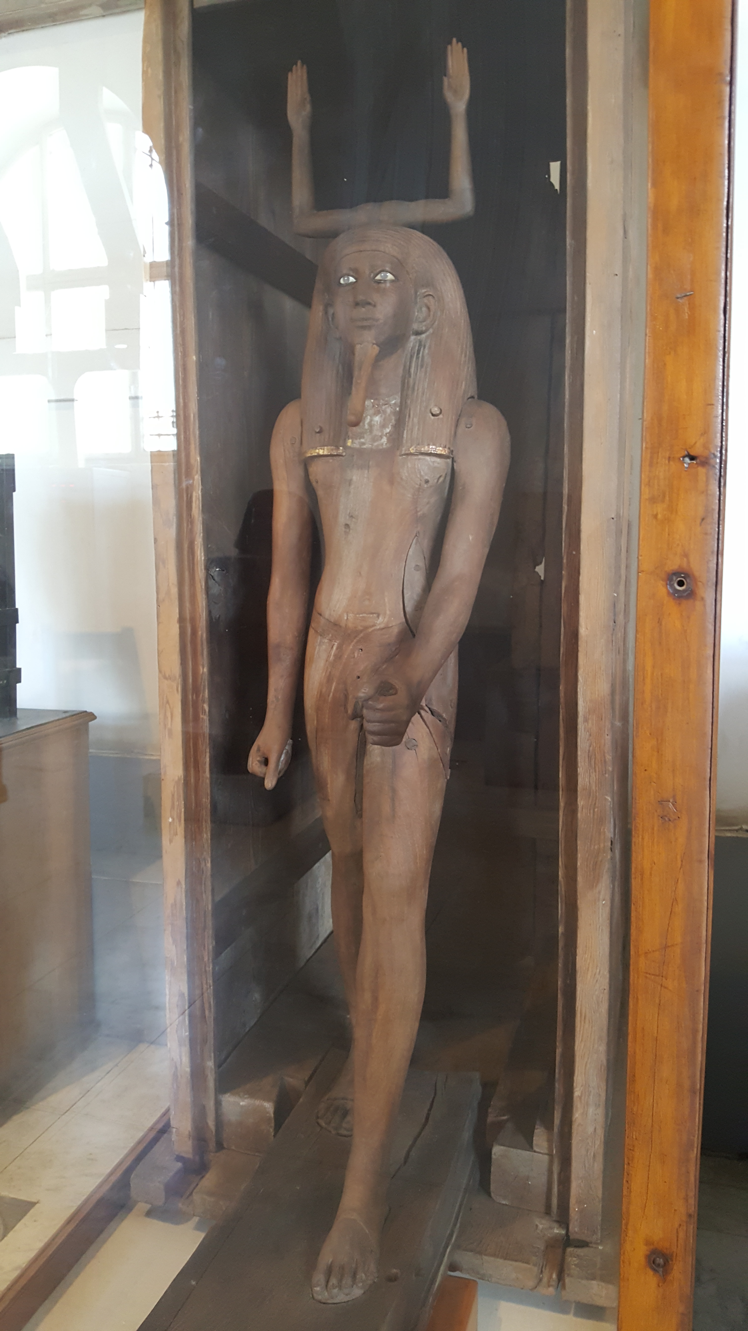 Egyptian Museum (Cairo)